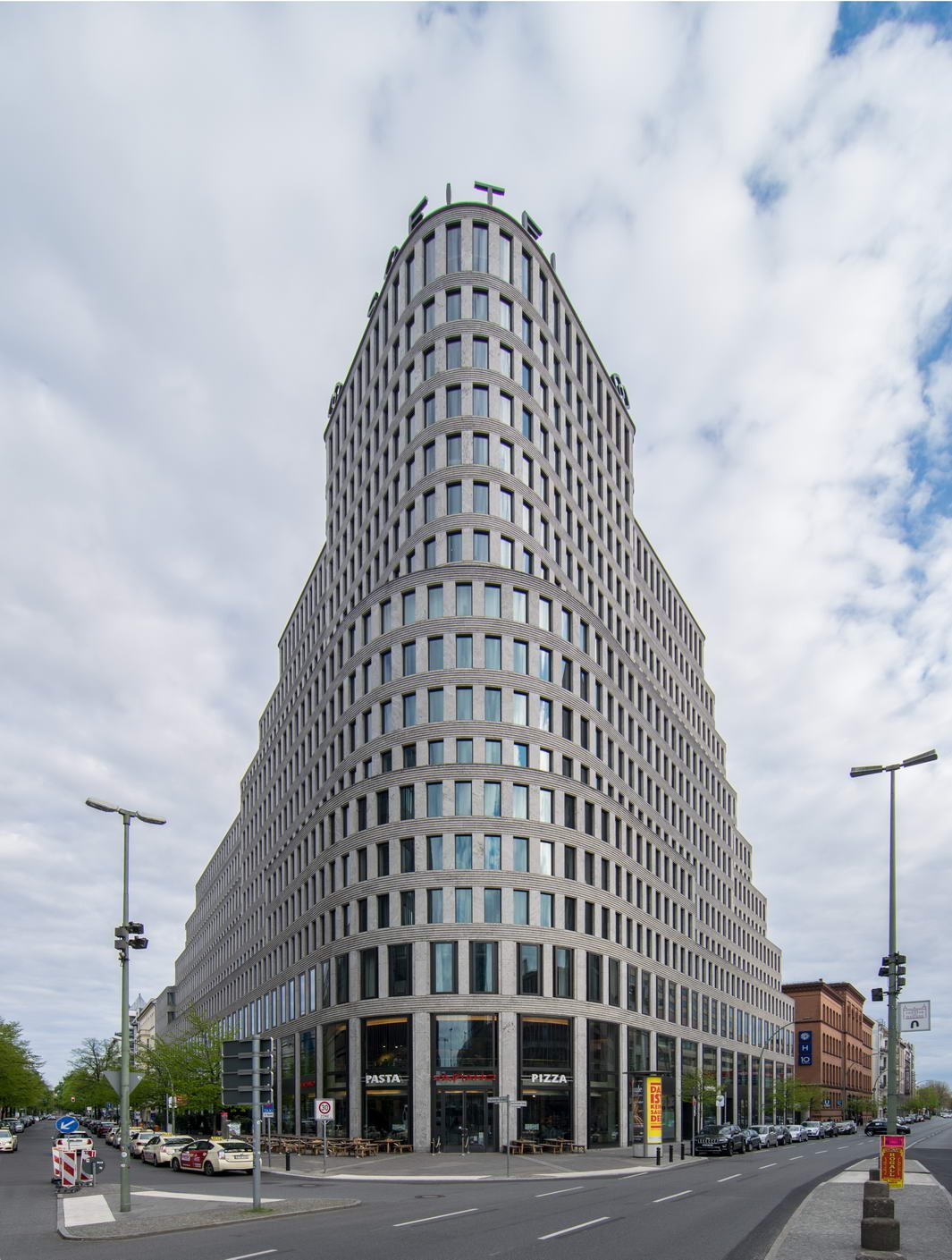 Sofitel am Kurfürstendamm in Charlottenburg-Wilmersdorf, Berlin